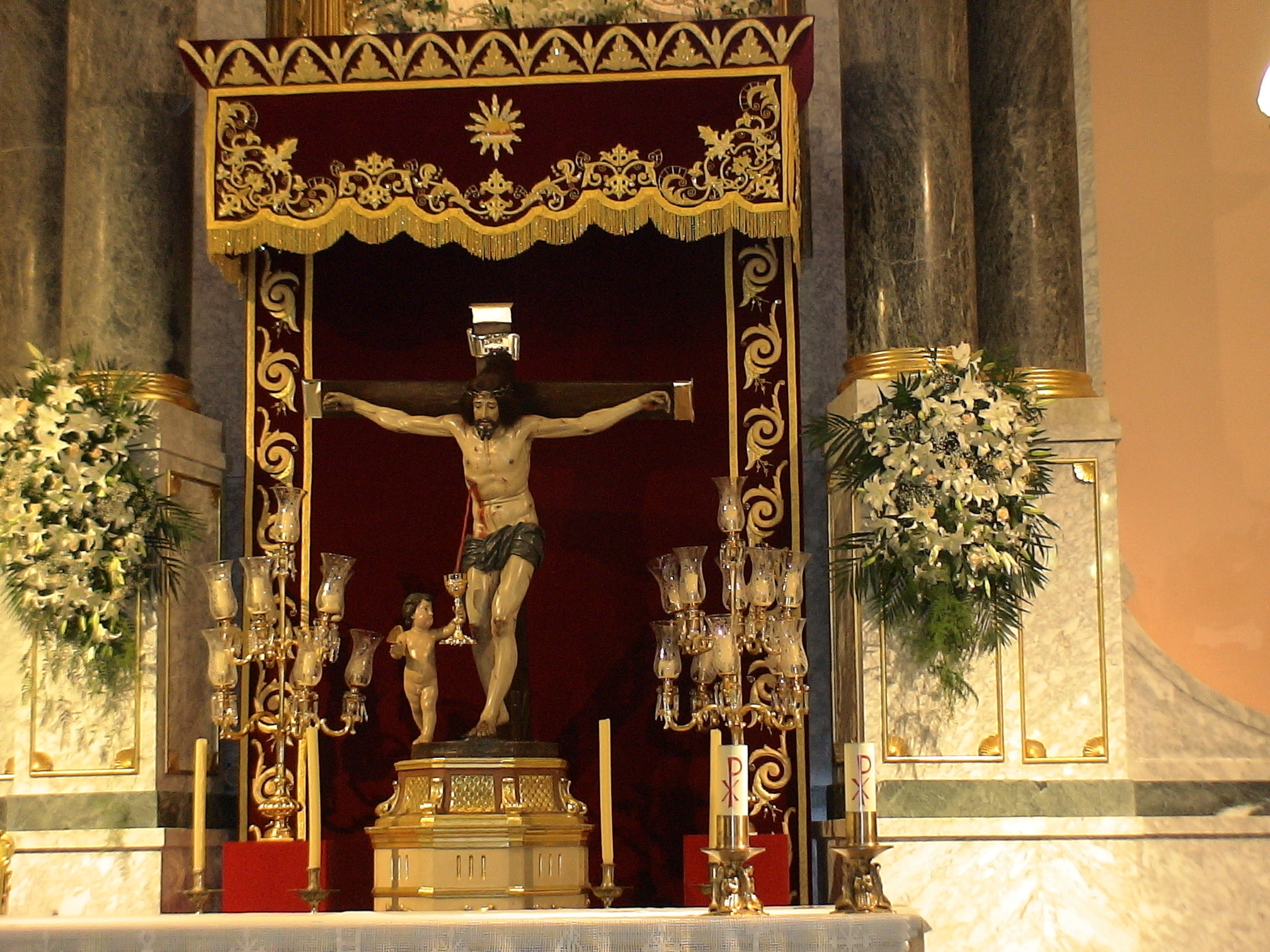 Santísimo Cristo de la Sangre, Iglesia Parroquial de Nuestra Señora del Carmen (Murcia).